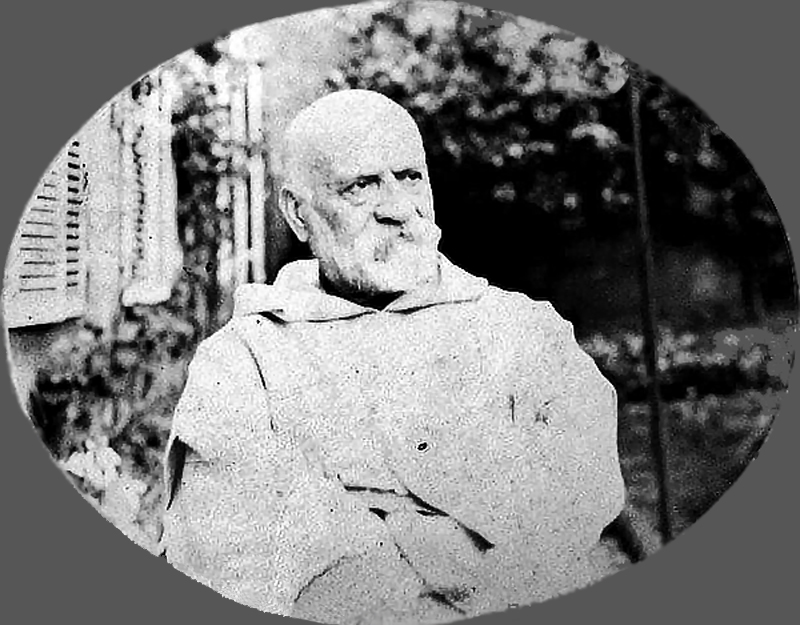 Jean-Vincent Scheil, père dominicain et assyriologue français né à Kœnigsmacker (Lorraine) le 10 juin 1858 - mort à Paris le 21 septembre 1940. Découvreur et traducteur de la stèle du code d'Hammourabi.